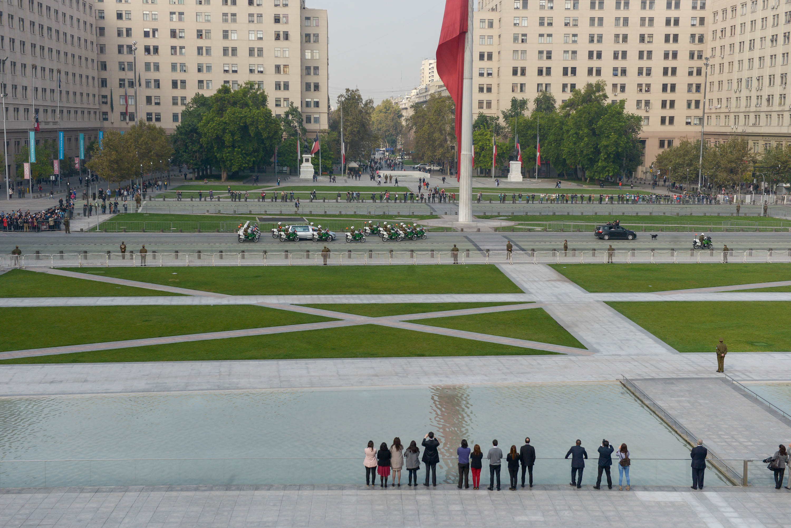 Ministro Marcelo Díaz asiste al velorio del ex Presidente de la Republica Patricio Aylwin en el ex Congreso Nacional